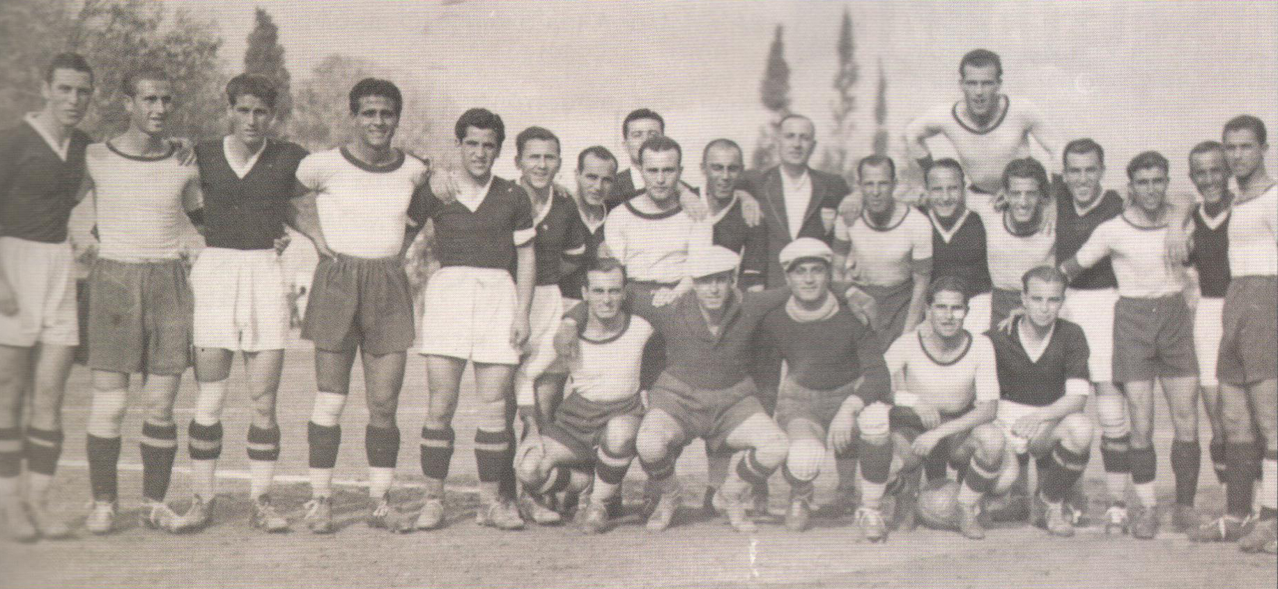 Oι ομάδες της ΑΕΚ και του ΠΑΟΚ στον τελικό Κυπέλλου Ελλάδας του 1939